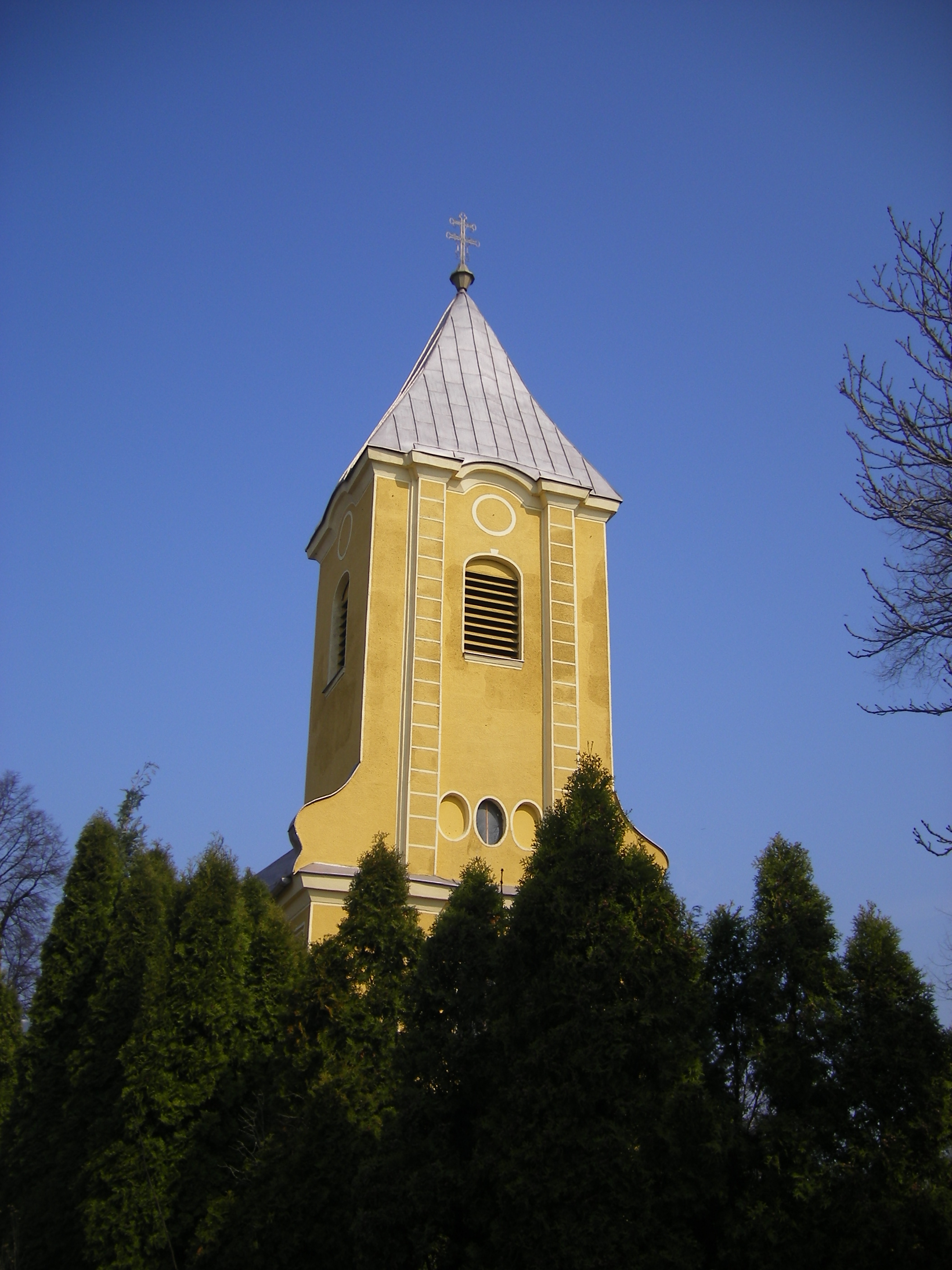 Ekecs katolikus temploma